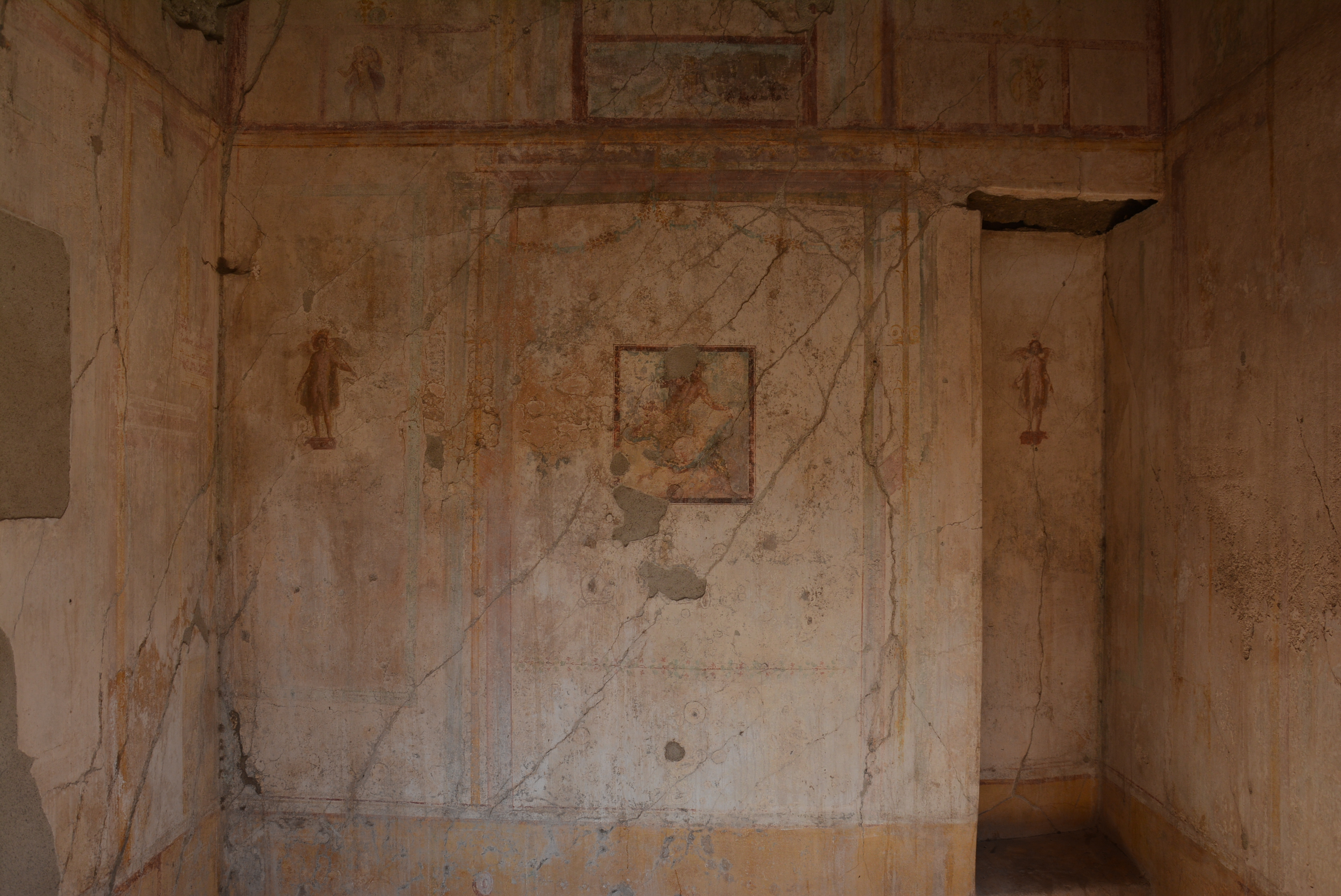 Casa di Marco Lucrezio - MIBACT This is a photo of a monument which is part of cultural heritage of Italy.